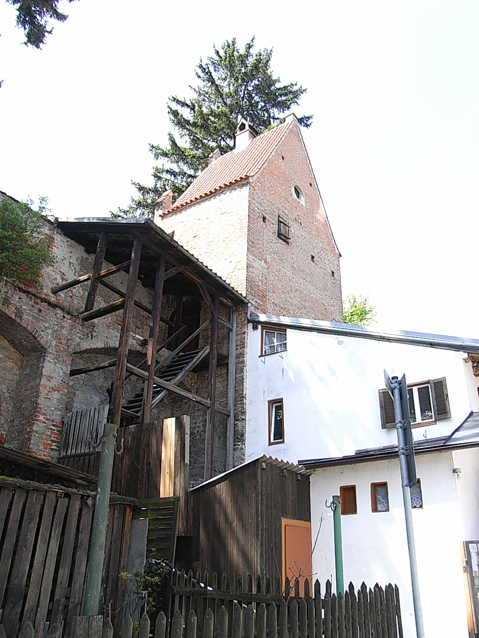 Der Soldatenturm